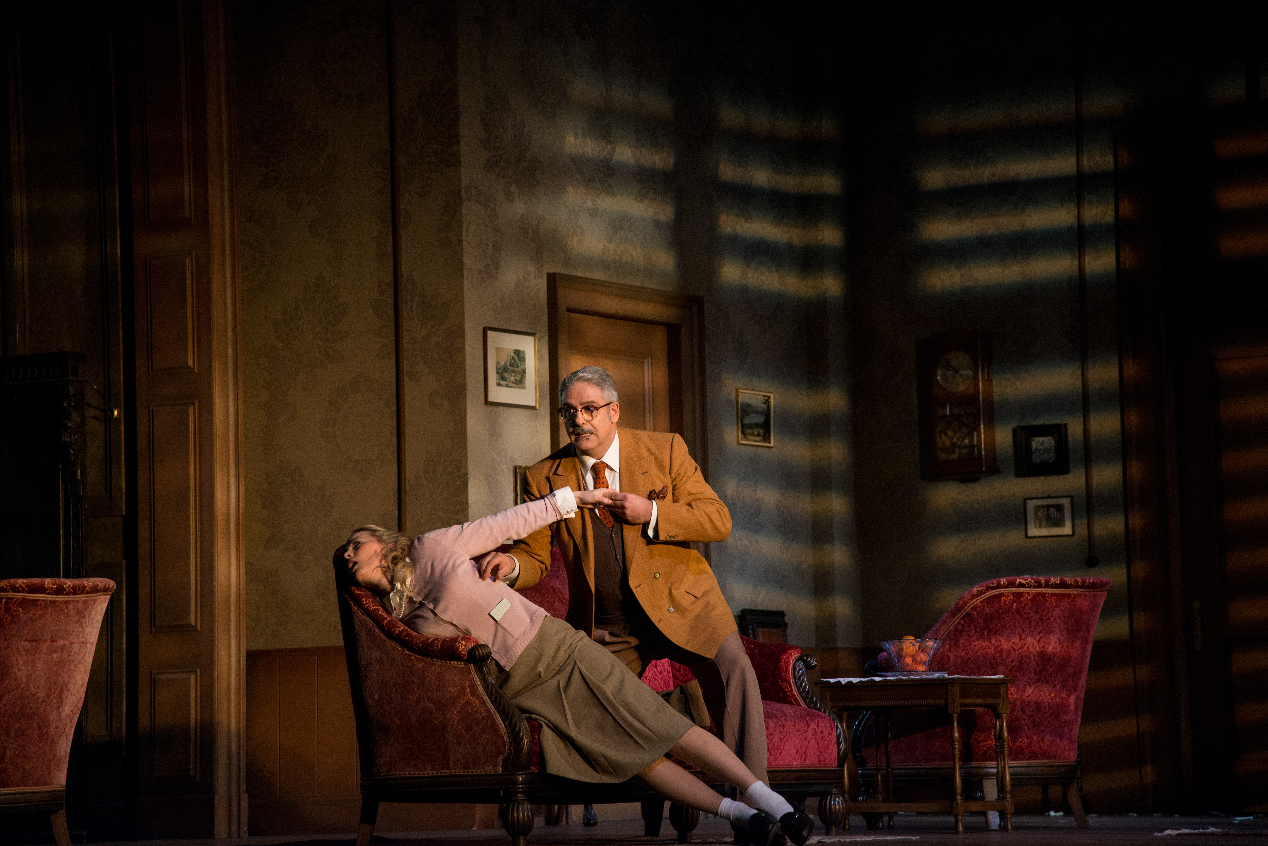 Il barbieri di Siviglia, Theater an der Wien 2015